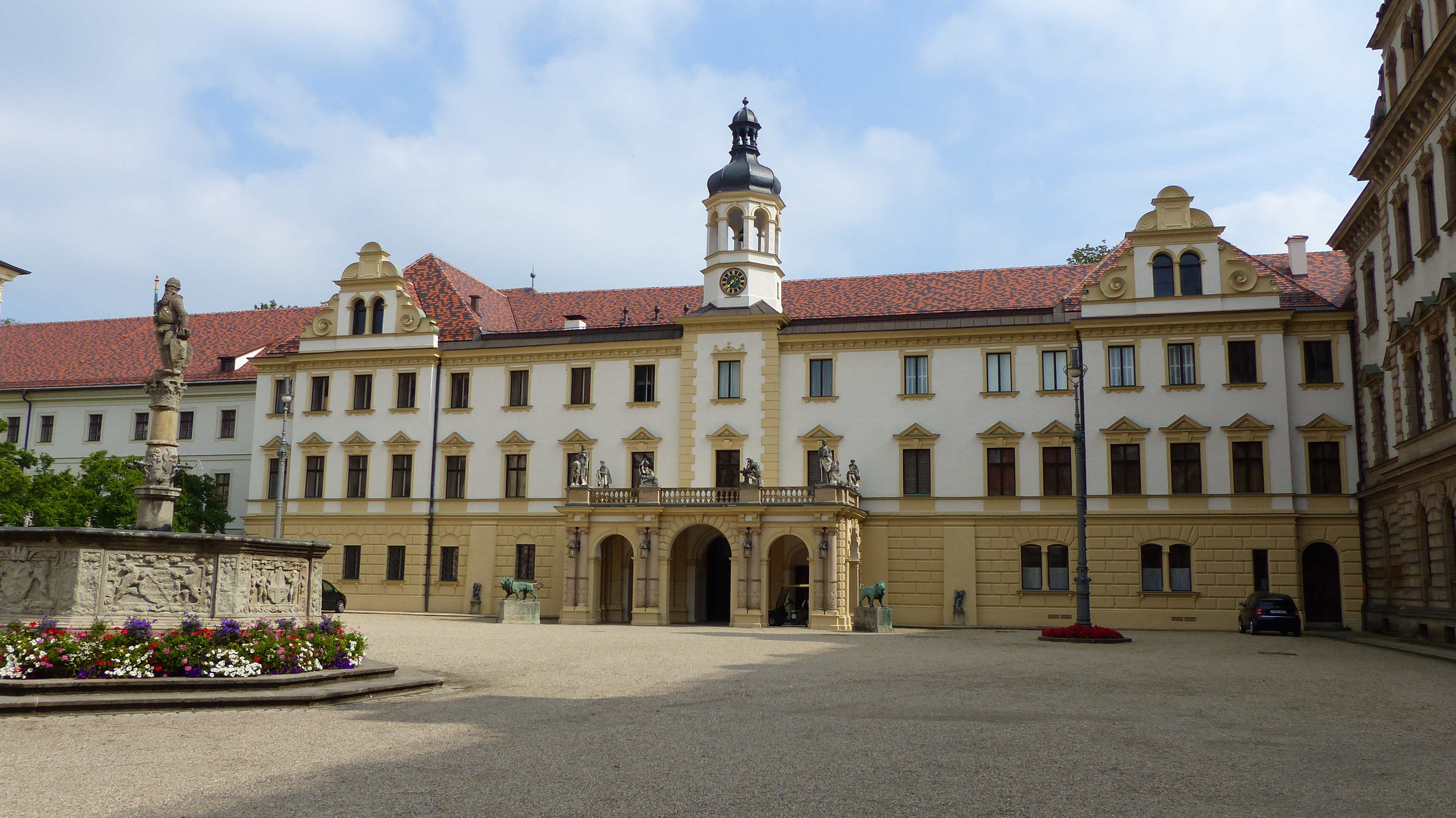 Schloss St. Emmeram von Thurn und Taxis in RegensburgThis is a photograph of an architectural monument.